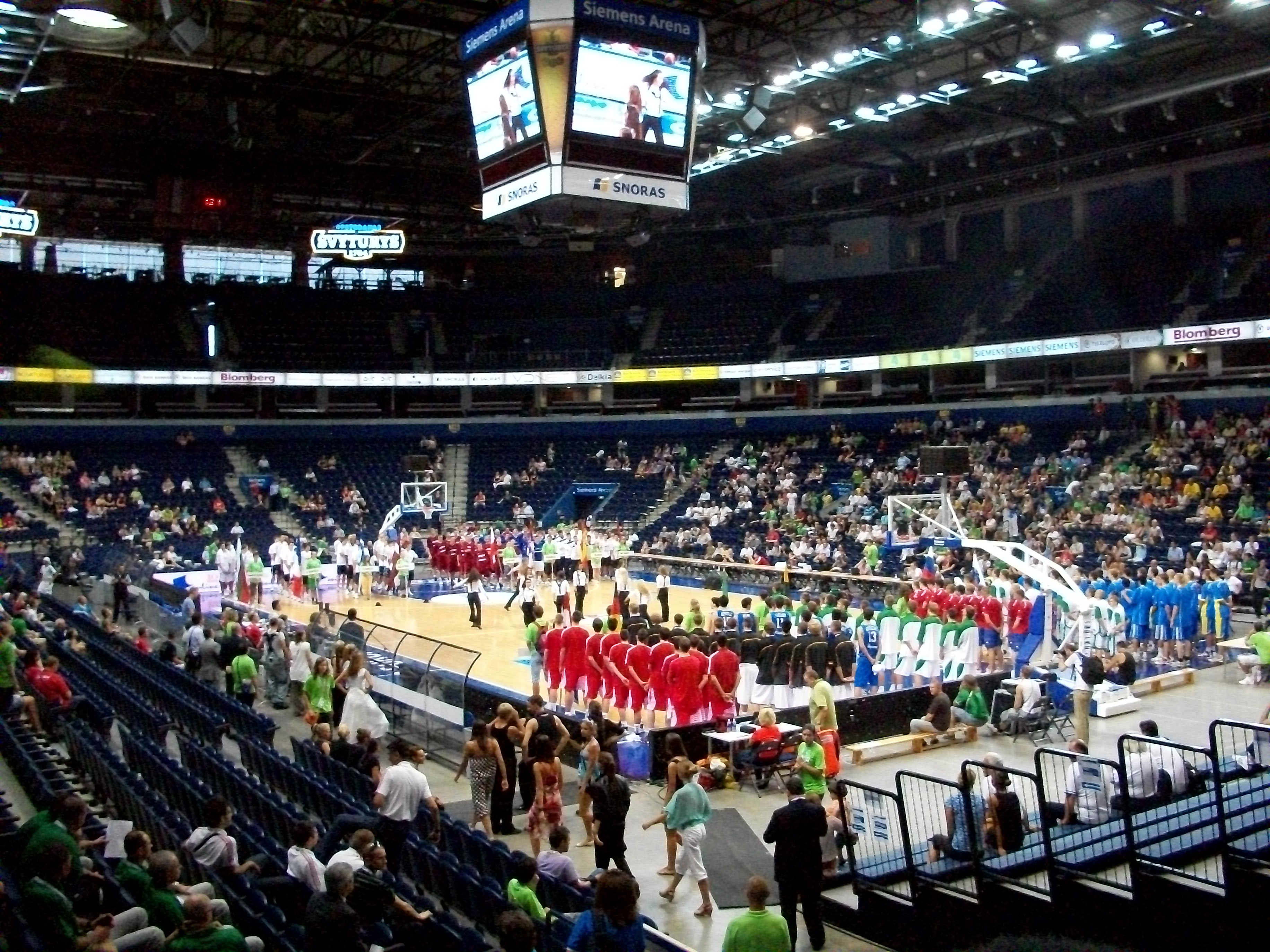 U-18 Europos krepšinio čempionato atidarymas Vilniuje